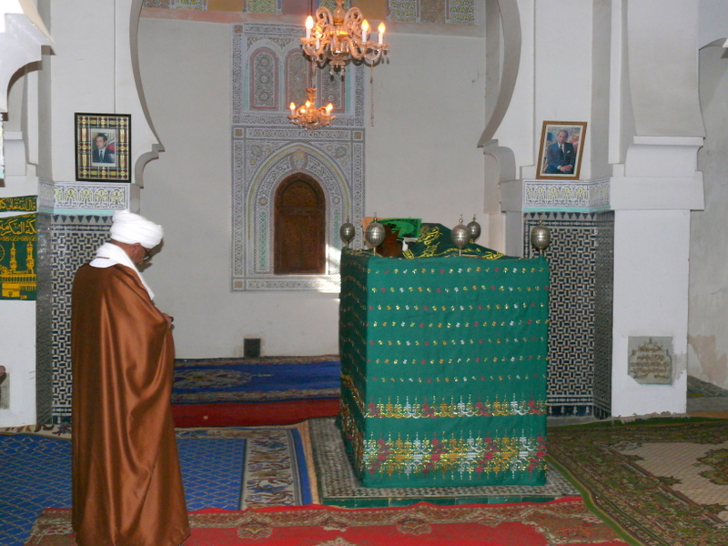 Das Grab von Ibn al-'Arabi (Innenansicht) ; Fès, Marokko